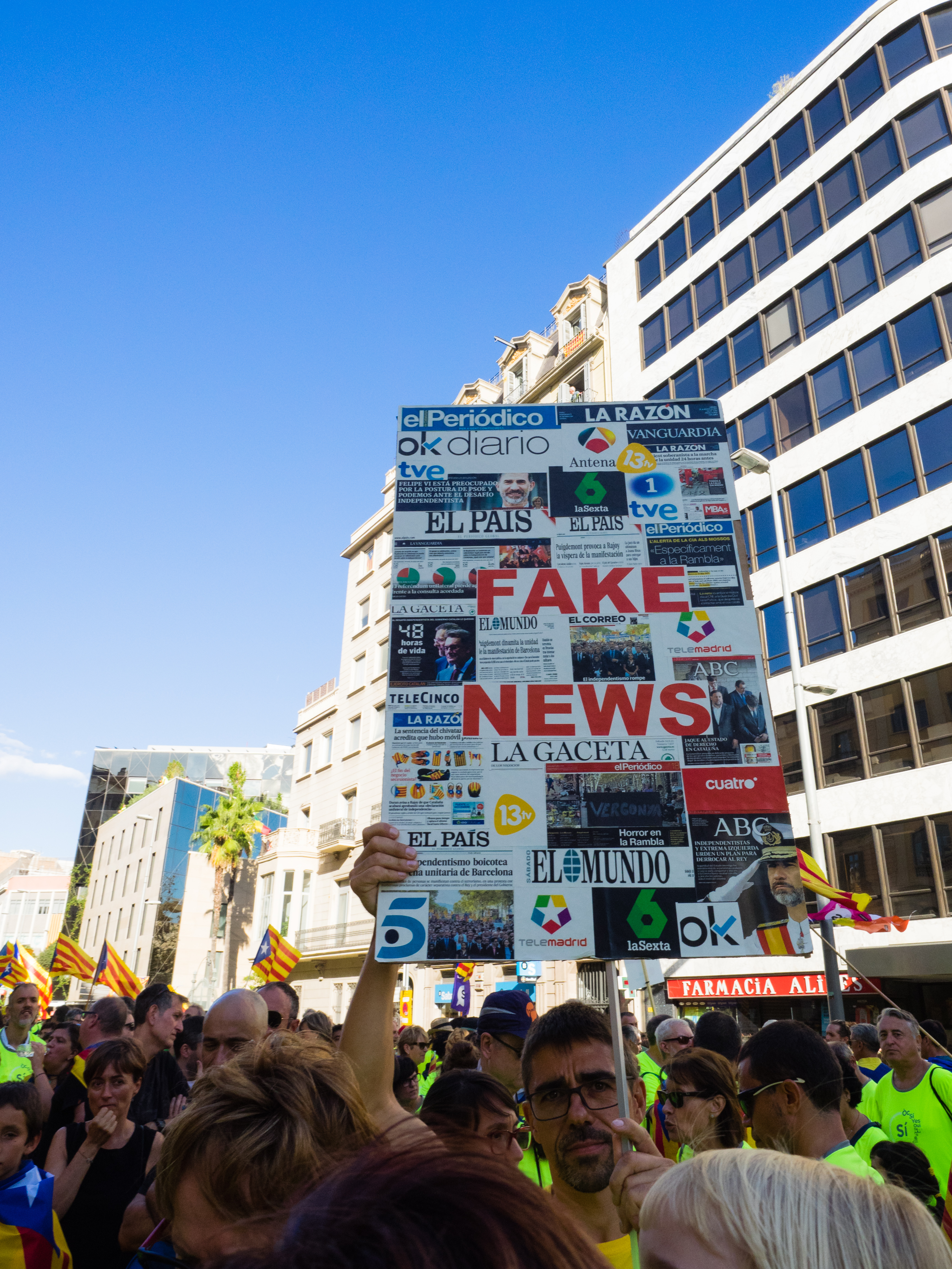 La manifestació Diada del Sí es va celebrar l'11 de setembre de 2017 a Barcelona.